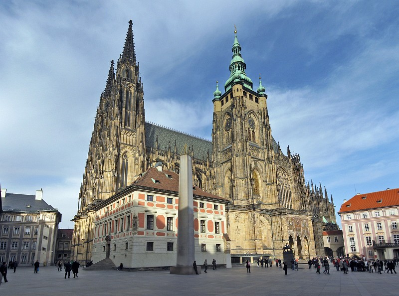 Прага. Собор св. Вита